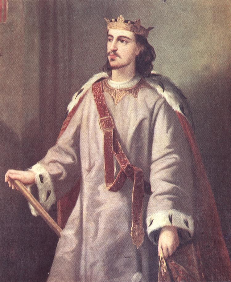 Retrato imaginario del rey Alfonso III de Aragón (1265-1291), que fue hijo del rey Pedro III de Aragón y de la reina Constanza II de Sicilia.